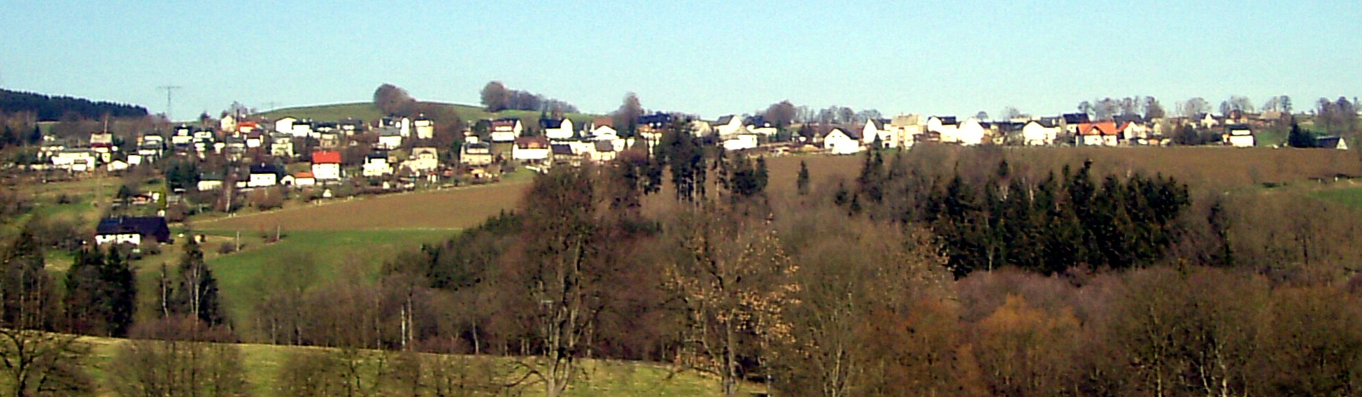 Blick auf den Lengefelder Ortsteil Wünschendorf